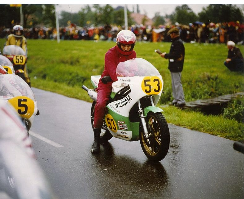 Alan North op de Wilddam Suzuki RG 500 op het circuit van Tubbergen 1977.